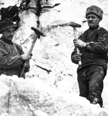 Kalkbrottet i Kalkbro 1929. Fr v Bror Lundell och Gustav Andersson Klang handborrar.